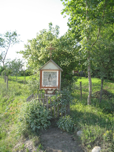 Kalnalio koplytelė